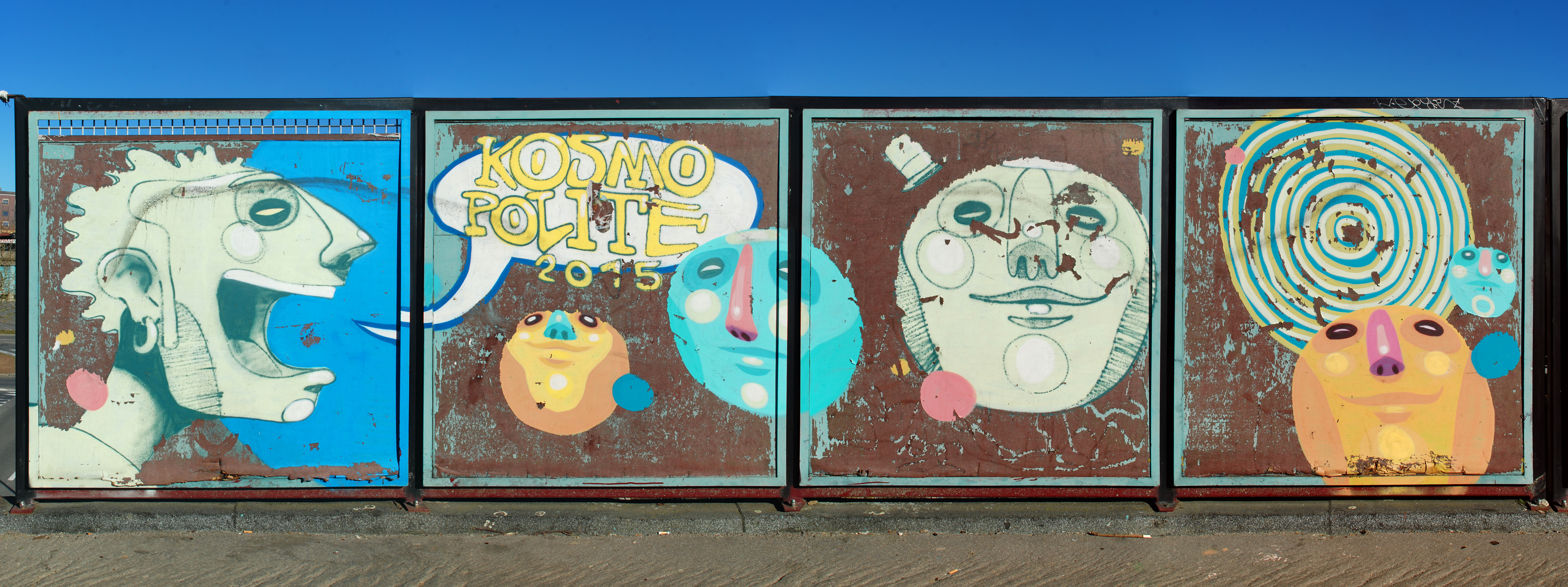 Belgique - Louvain-la-Neuve - Chemin des Lorrains (passerelle) - Fresques de Zësar Bahamonte (Kosmopolite Art Tour 2015 à Louvain-la-Neuve)